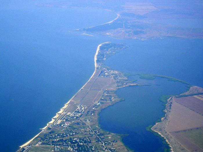 Лагерна (Чорноморська) коса